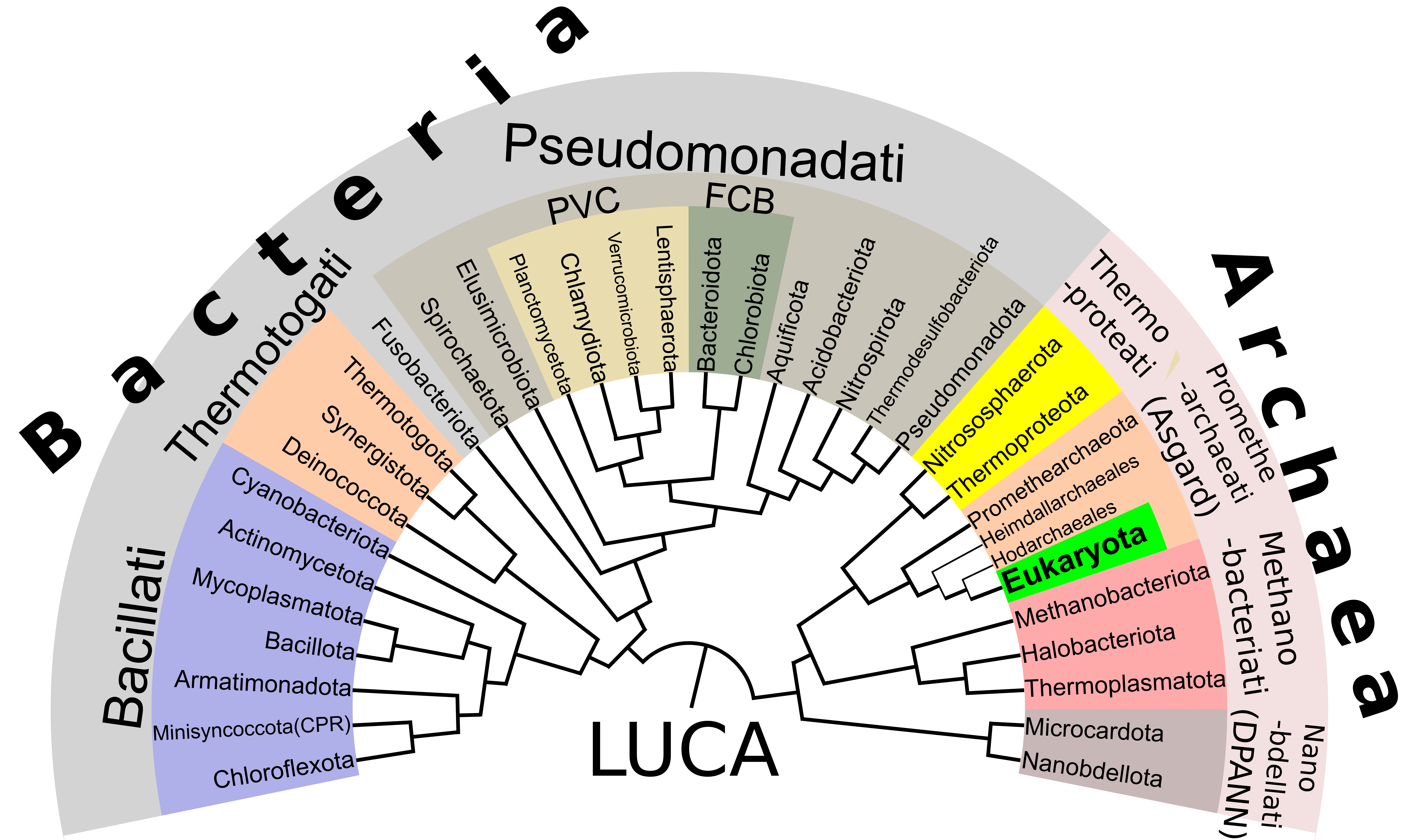 原核生物を中心とした全生物の系統樹